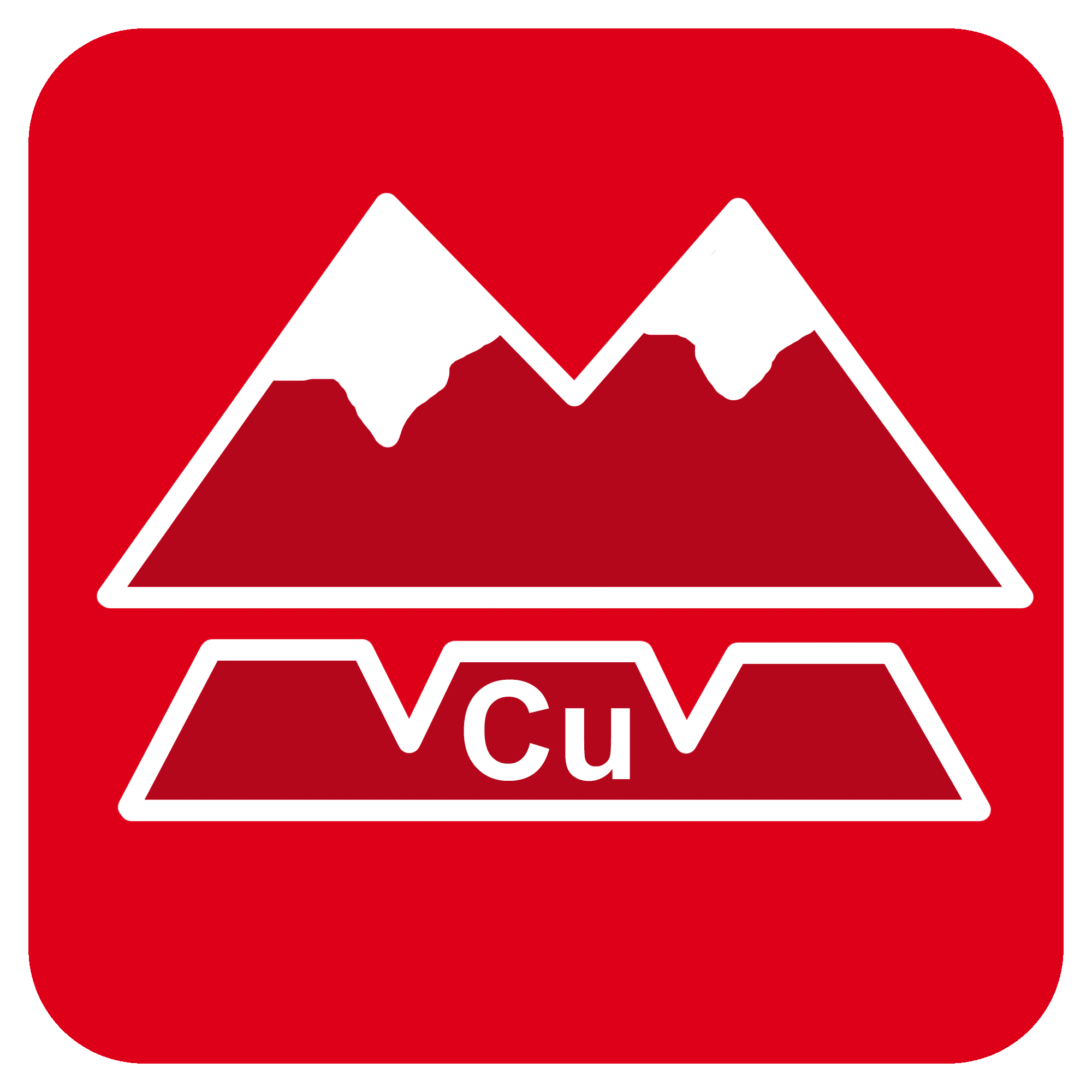 Símbolo utilizado para identificar a la estación Rancagua en 2001.